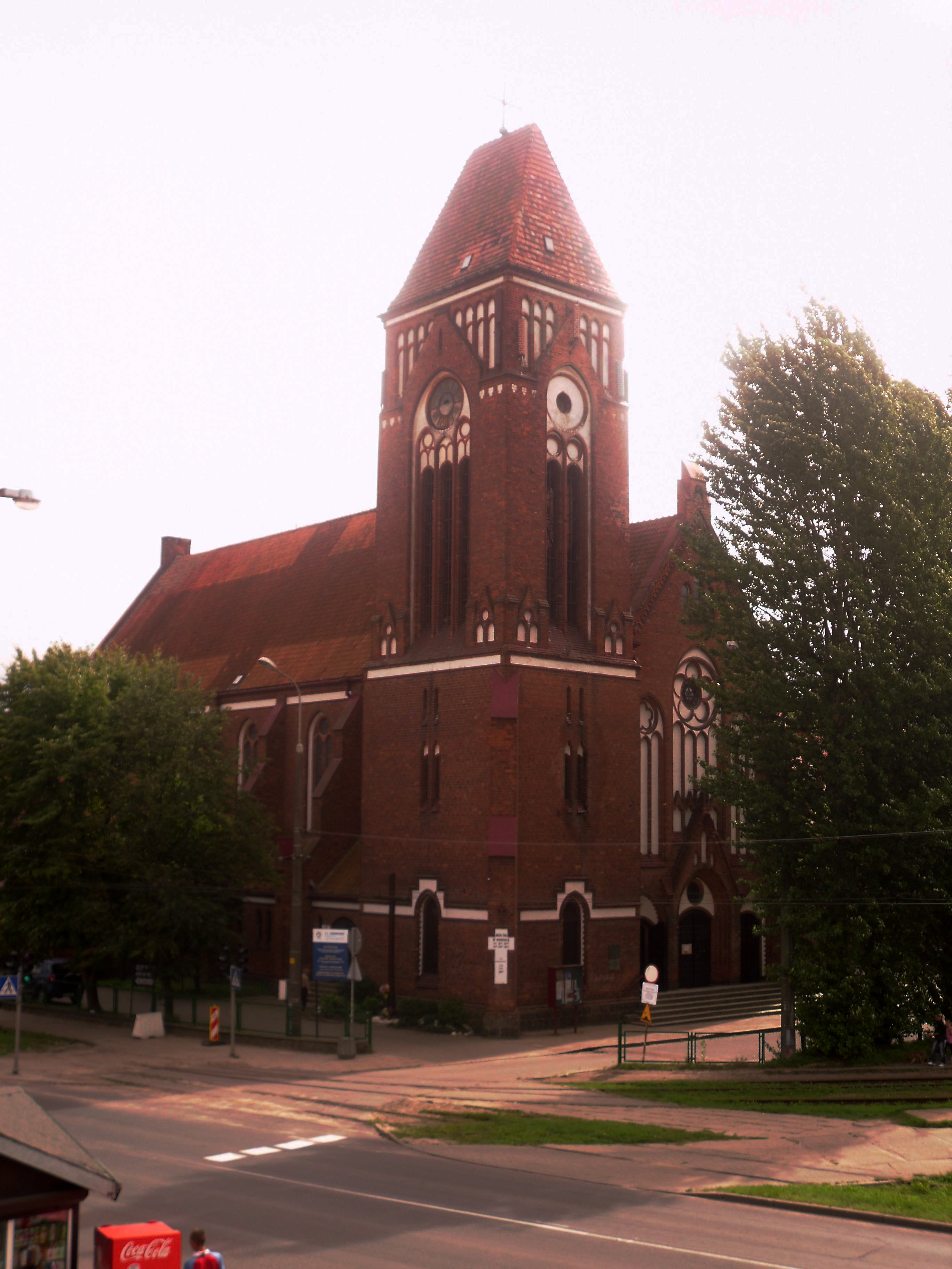 Gdańsk Siedlce (Emaus), ul. Kartuska 186 - rzymskokatolicki kościół parafialny p.w. św. Franciszka, 1904-1906